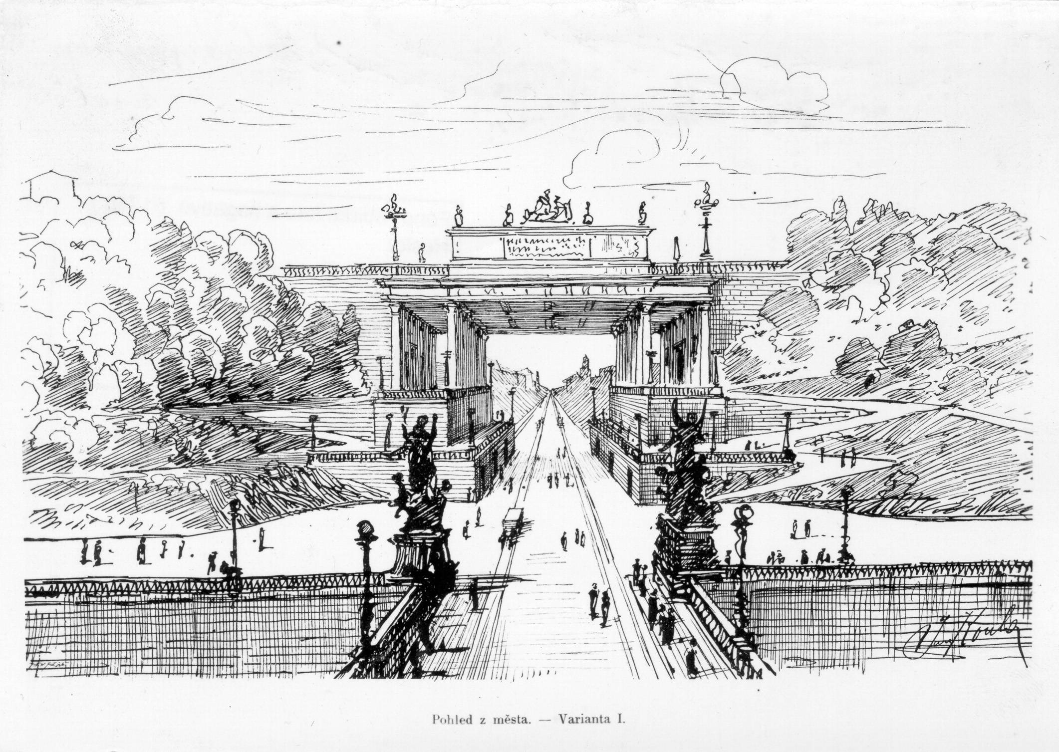 Fotokopie neuskutečněného návrhu architekta Jana Kouly na průkop v Letenské pláni